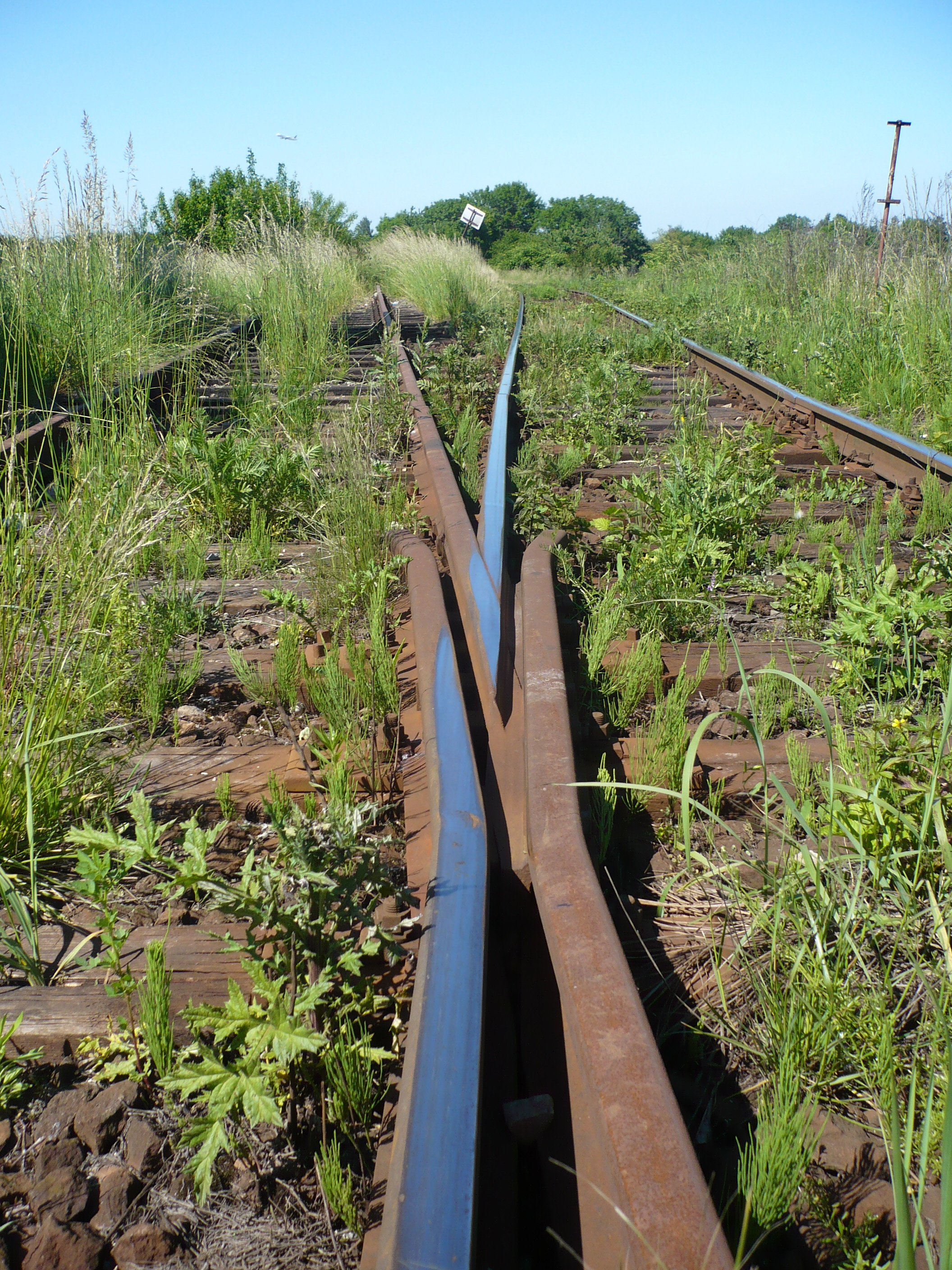 Výhybka Jeneček St 1, vybudovaná na trati Praha–Most ve čtyřicátých letech 20. století. Ve směru přímo původně pokračovala trať do Mostu (zahájení provozu v květnu 1873), vlevo odbočuje trať do Hostivic, dnes součást trati Praha–Rudná u Prahy (trať 122). Na horizontu letadlo startující z terminálu Sever letiště Praha-Ruzyně, kvůli kterému byla trať do Mostu v úseku Hostivice–Kněževes přeložena.